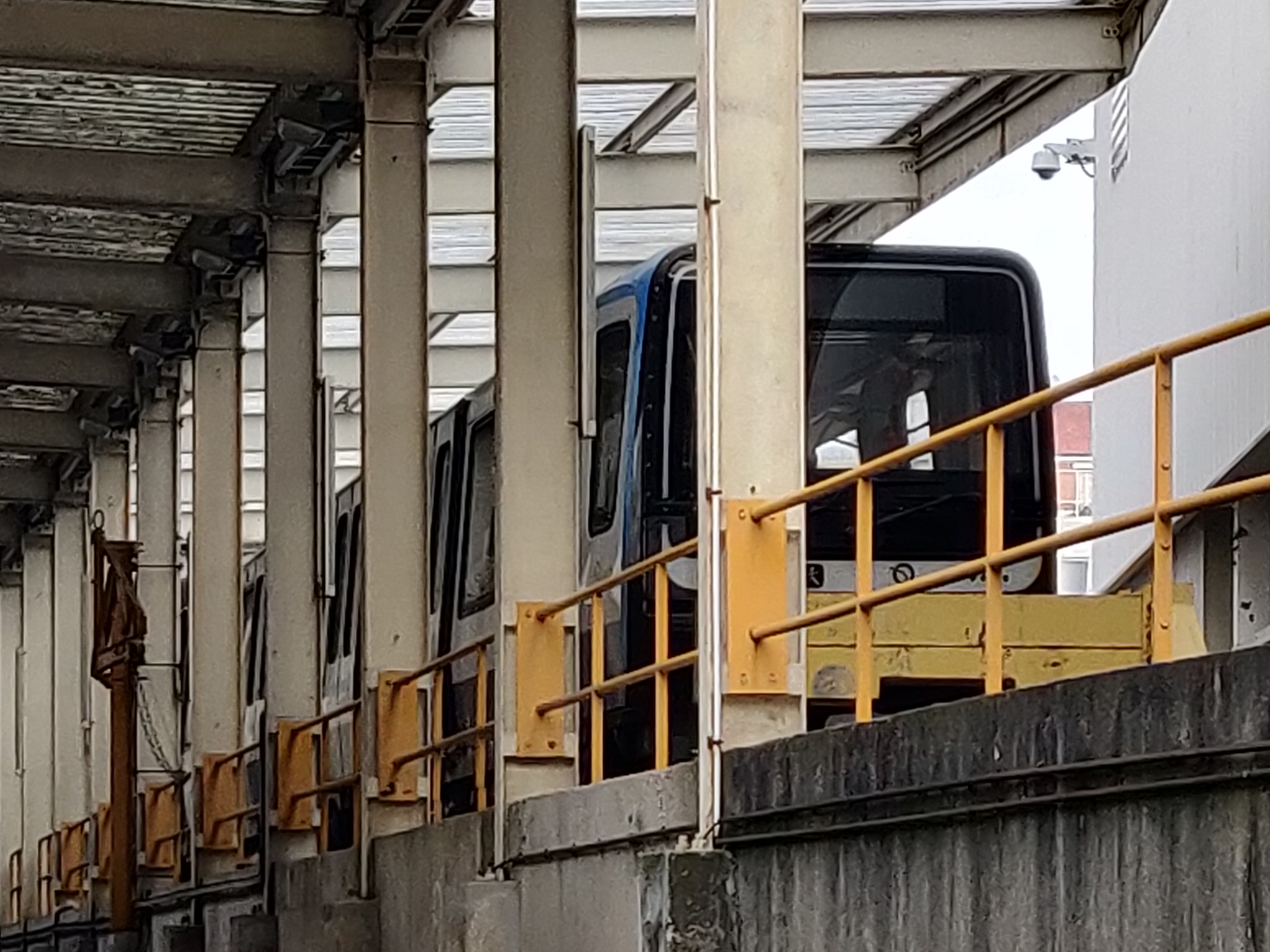 Un MP14 aux Ateliers RATP de Fontenay-sous-Bois. Il est stationné pour des tests